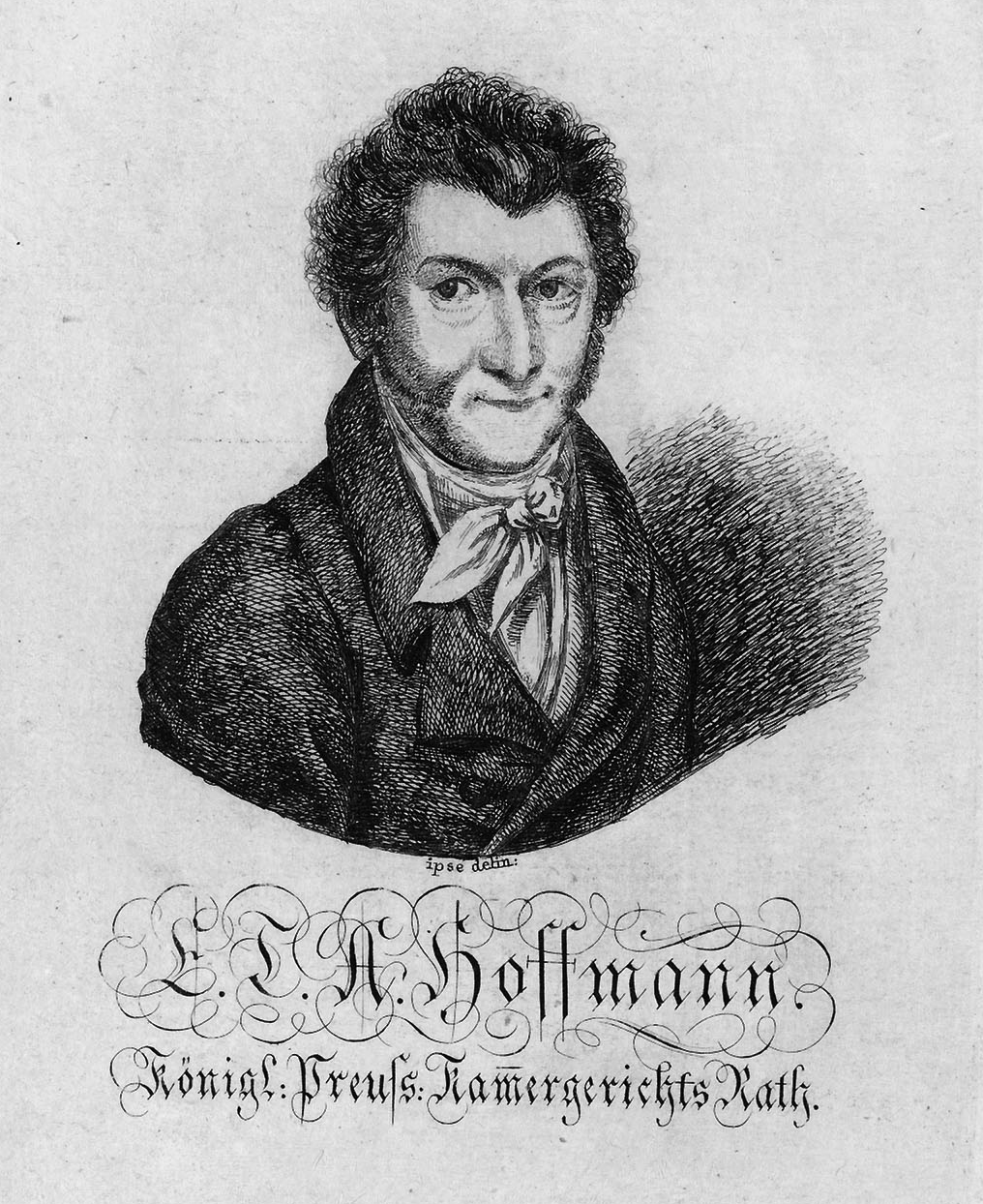 Selbstportrait E.T.A. Hoffmanns als Frontispiz zu seinen Fantasiestücke in Callot’s Manier.